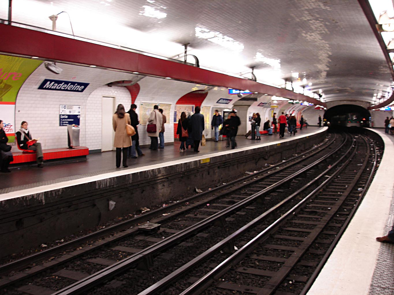 Métro de Paris - ligne 12 - Station Madeleine (France)